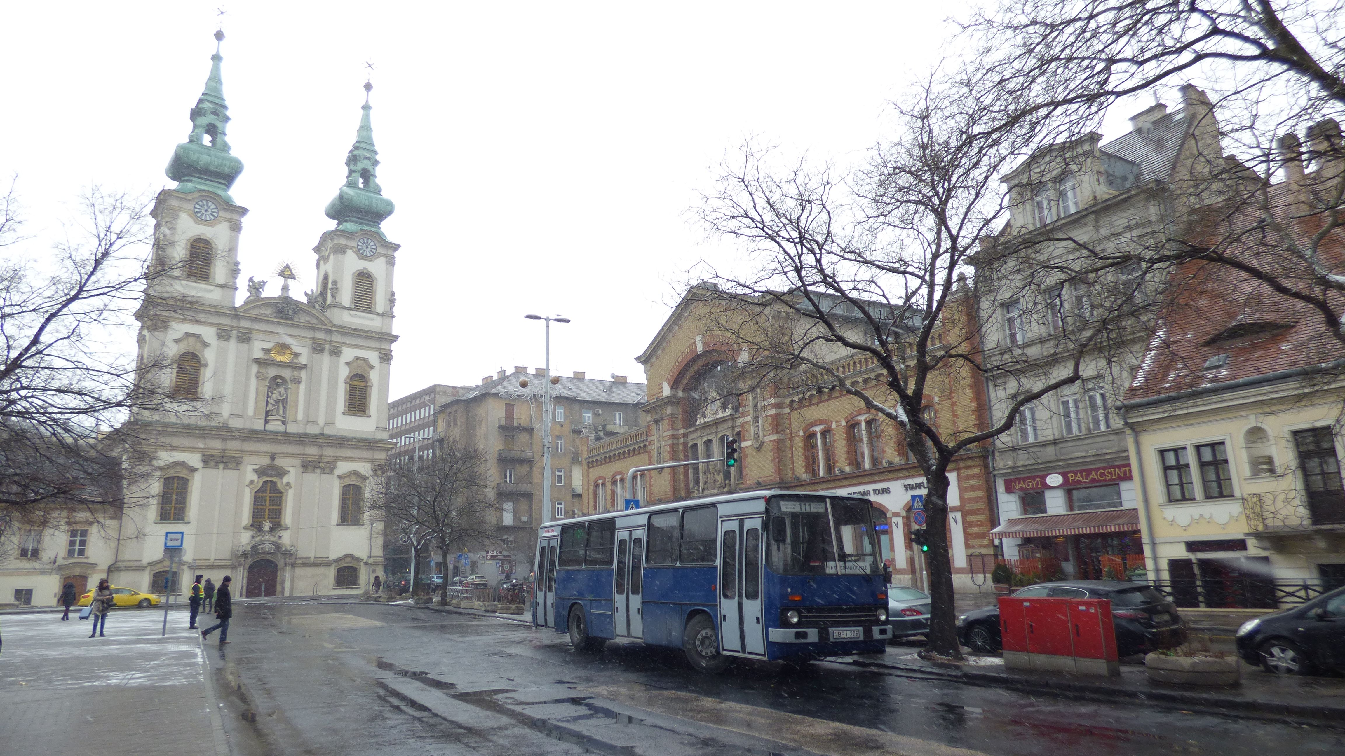 111-es jelzésű Ikarus 260-as busz a Batthyány téren (frsz. BPI-206)